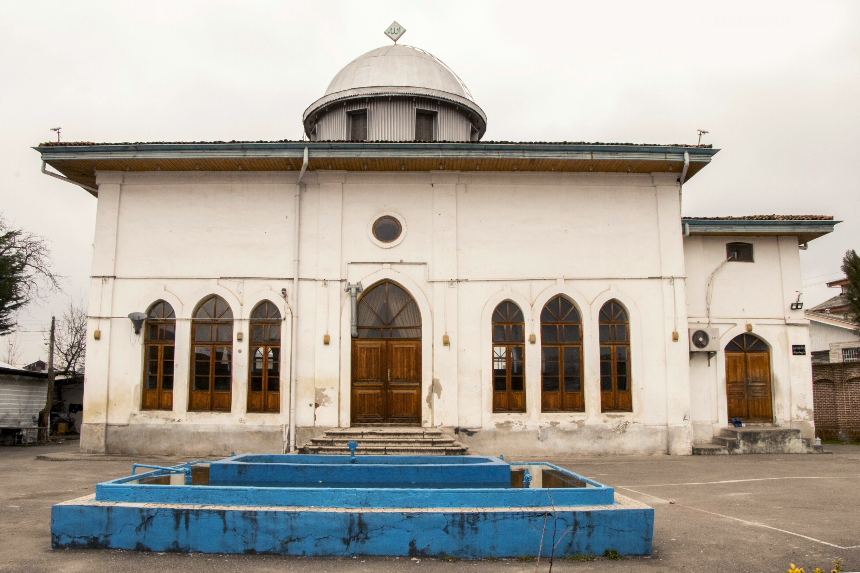 مسجد حاج صمد خان